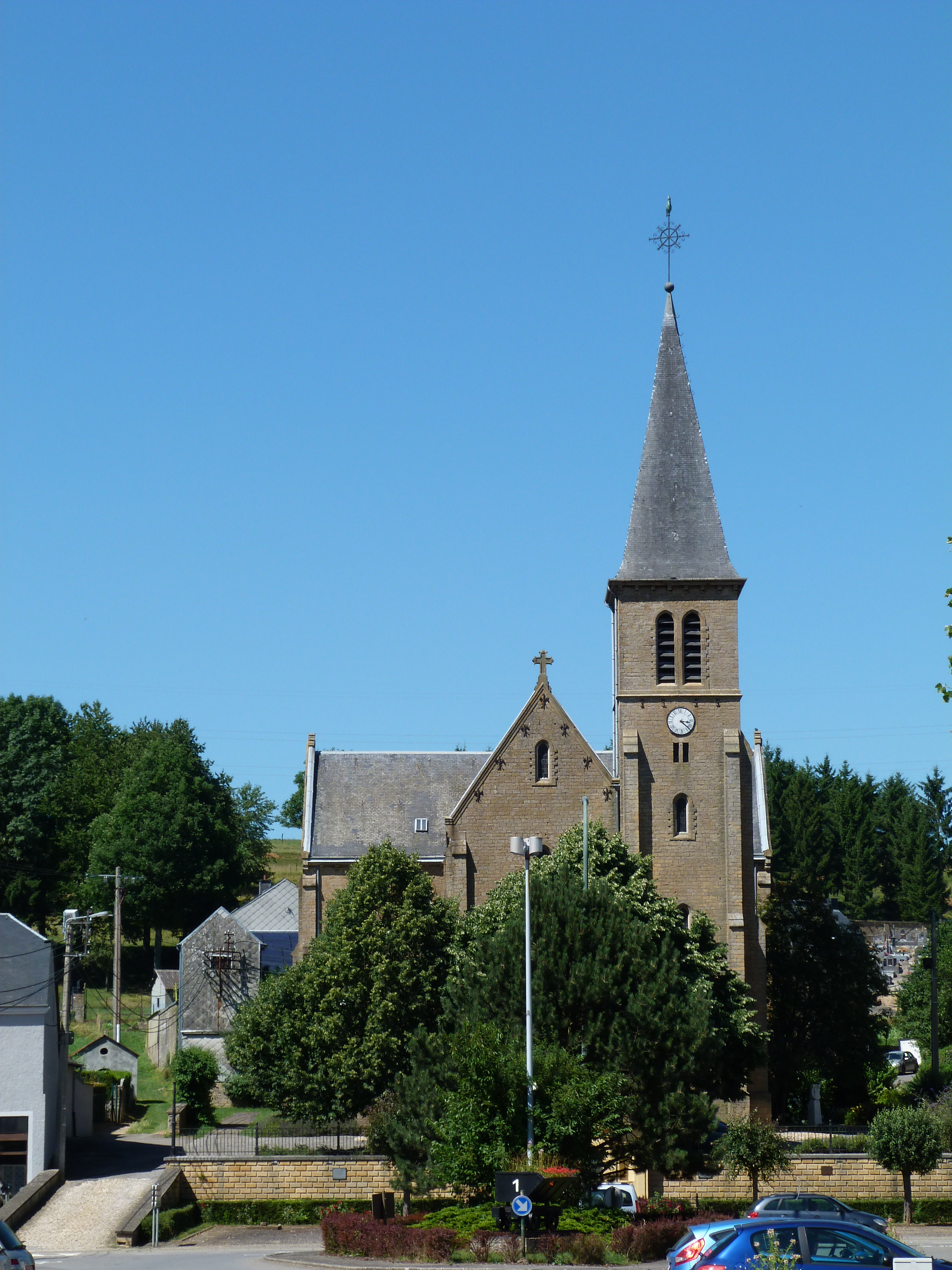 L'église de Musson en août 2013